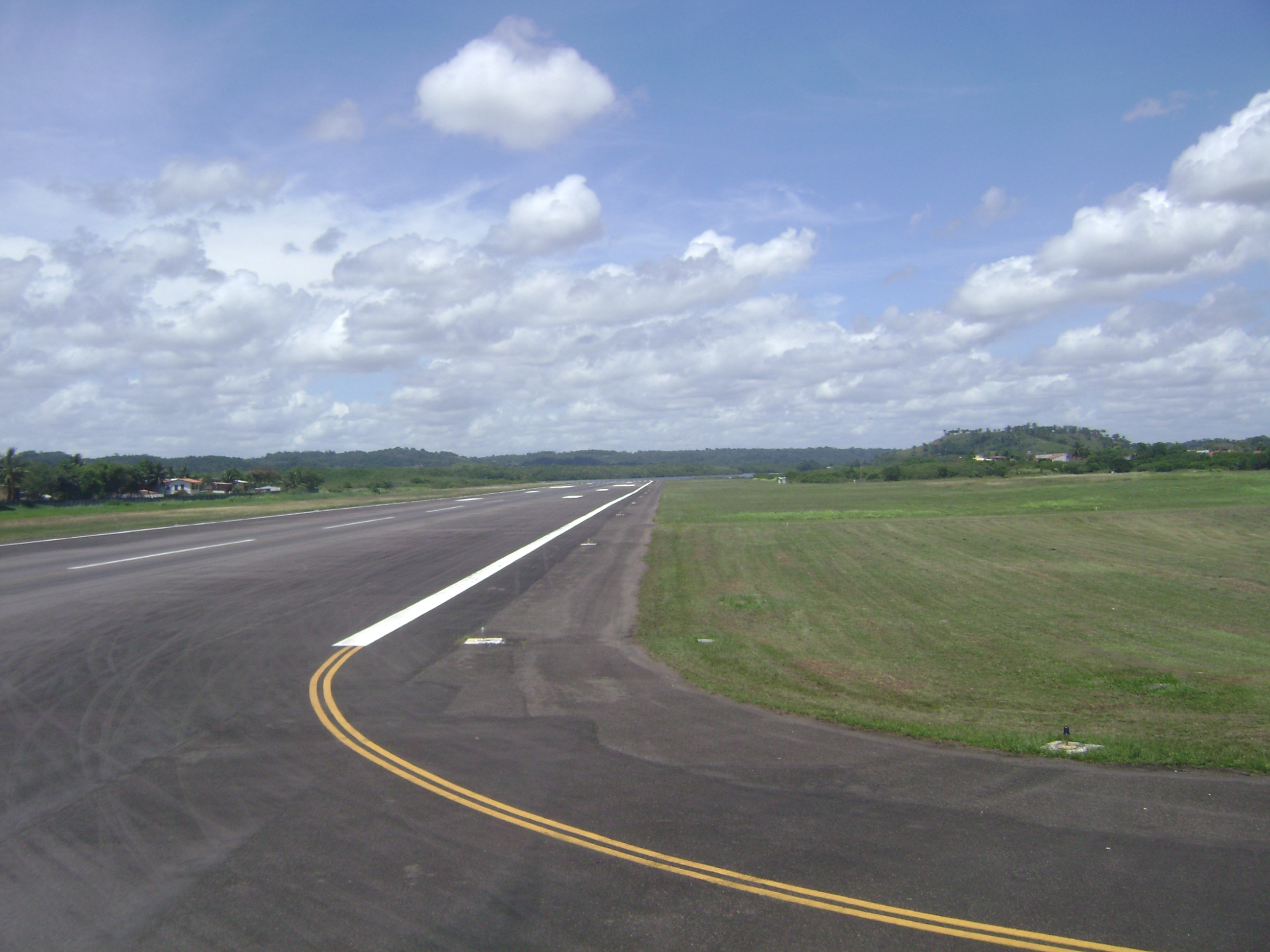 Cabeceira 11 do Aeroporto de Ilhéus - Jorge Amado, Ilhéus, Bahia, Brasil.